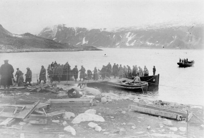 Polarfahrt mit dem Dampfer "München".- Ausbooten im Virgohafen 17. Juli - 12. August 1925